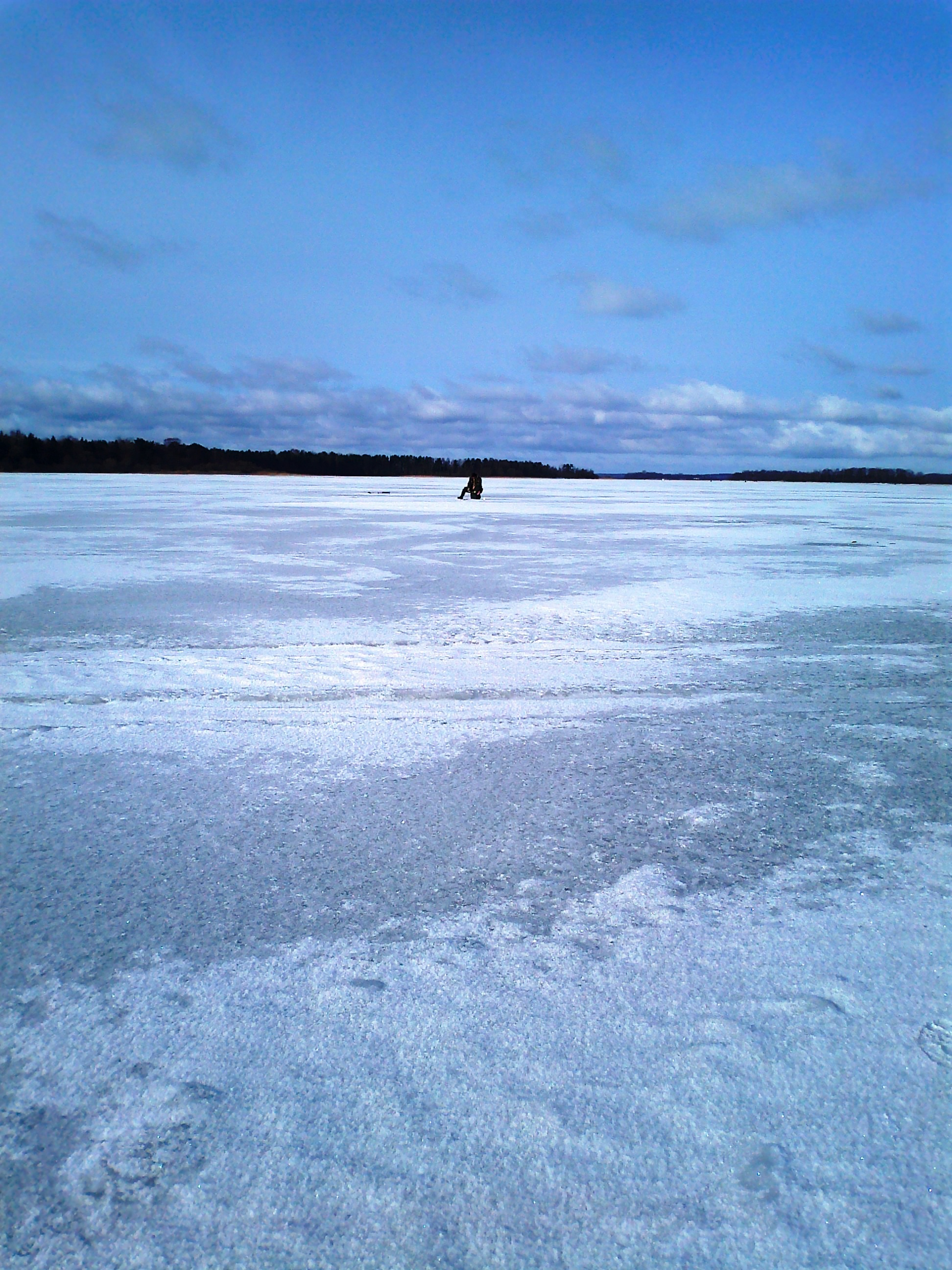 Зимняя рыбалка на Жижицком озере.